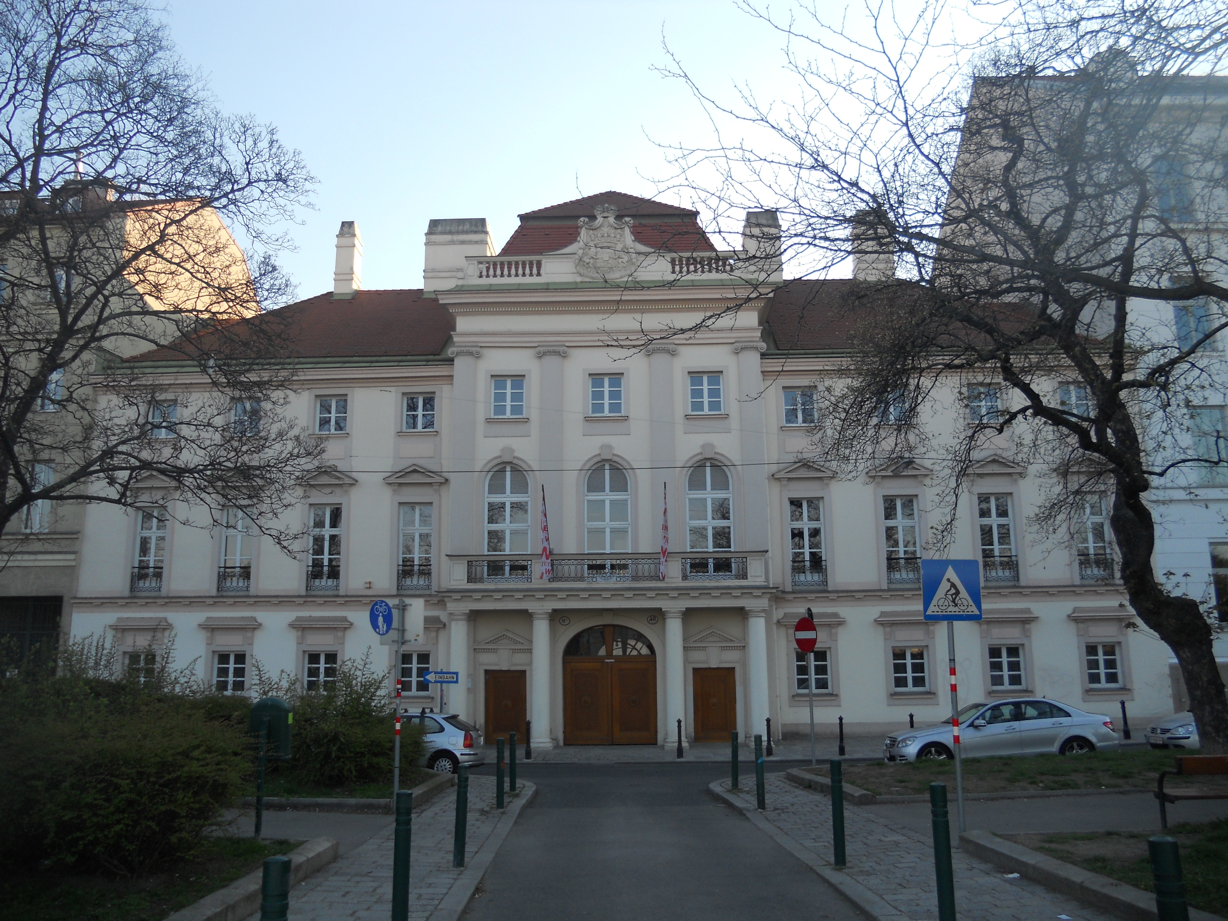 Gartenpalais, Palais Grassalkovich